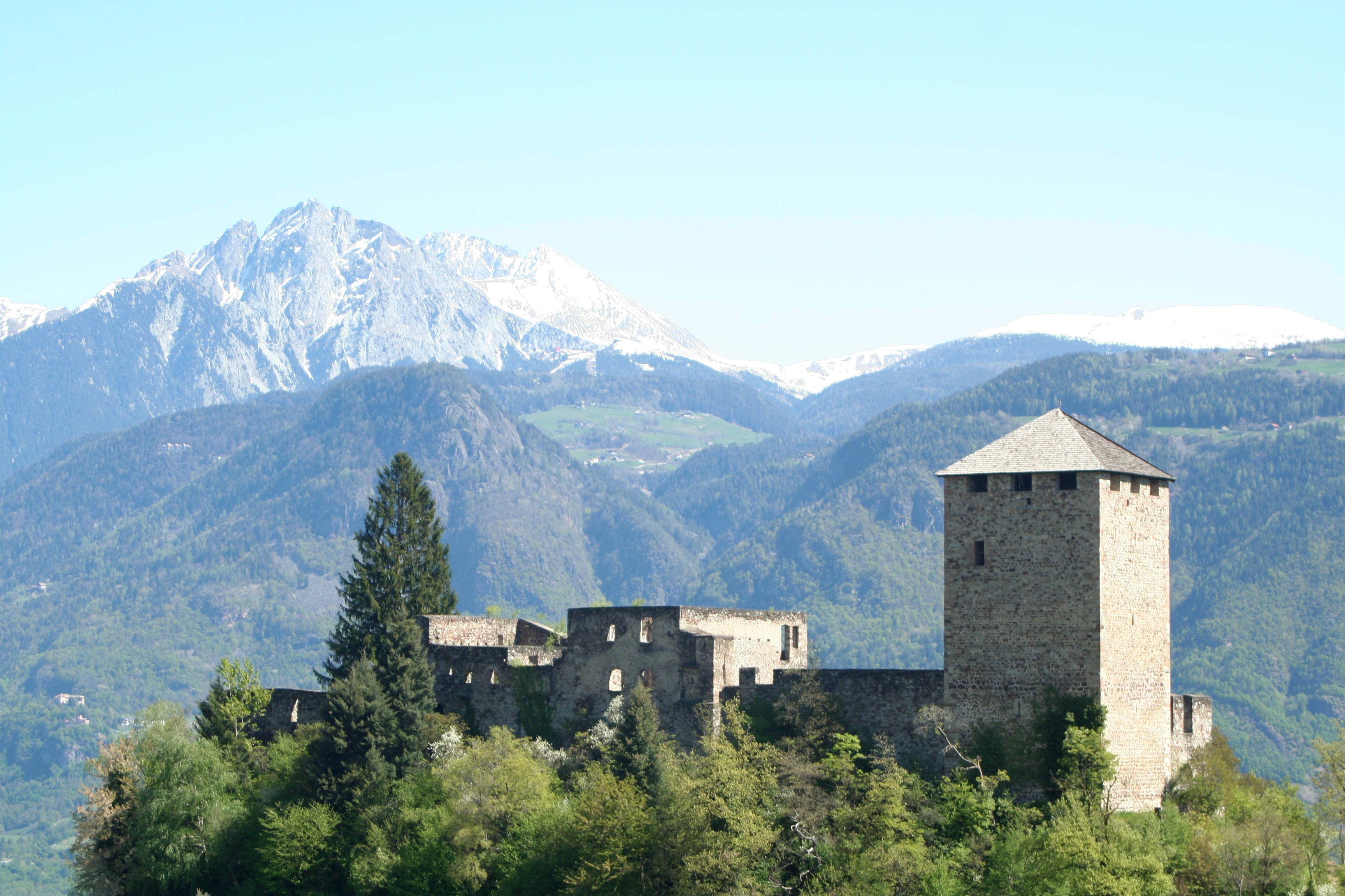 Die Mayenburg (auch Maienburg) in Völlan (Lana, Südtirol), im Hintergrund der Ifinger